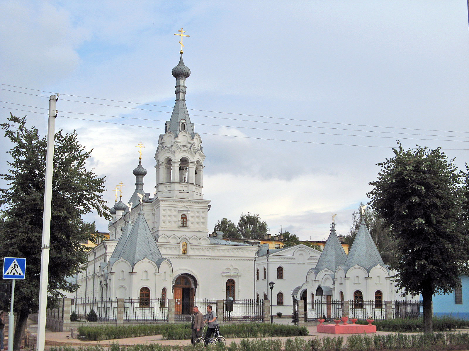 St.George church (Babrujsk)